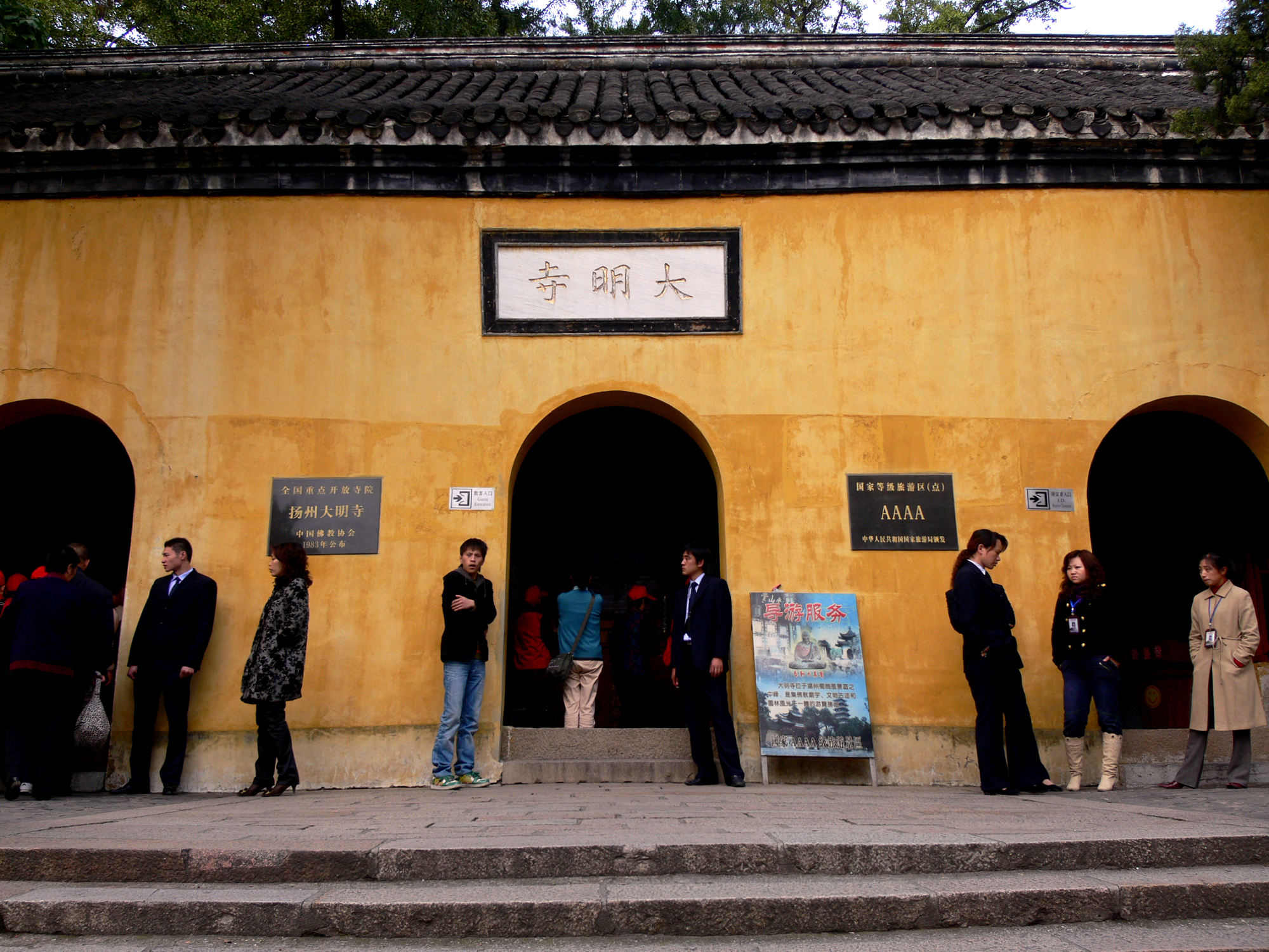 Da Ming Temple, Yangzhou 扬州大明寺